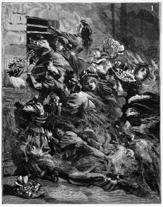 Incendie du Bazar de la Charité. Extrait du Petit Journal, Supplément illustré du 16 mai 1897, p. 5.